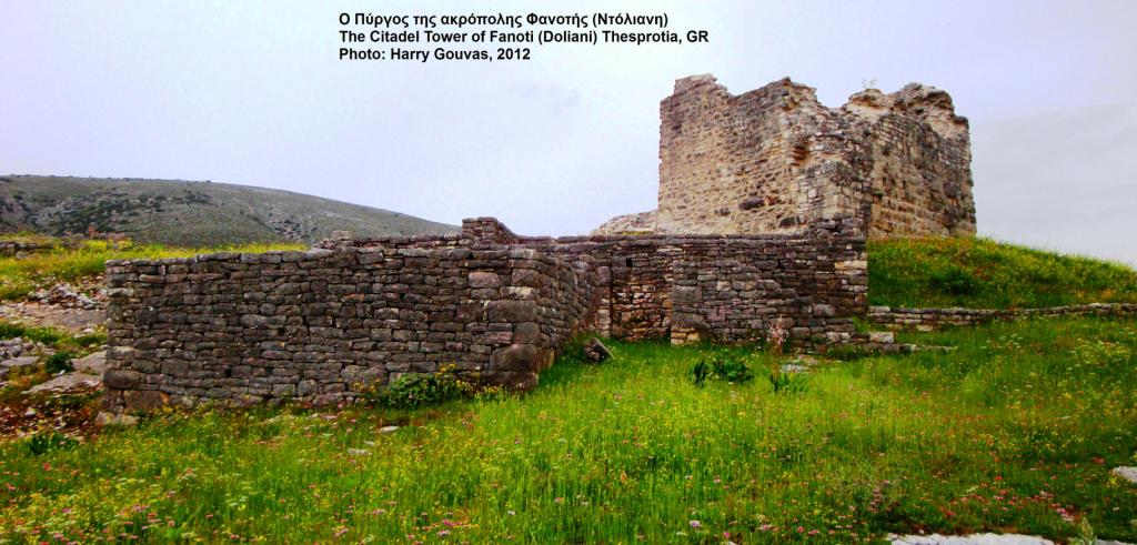 Αρχαία Φανοτή, Ο Πύργος της κορυφής της ακρόπολης